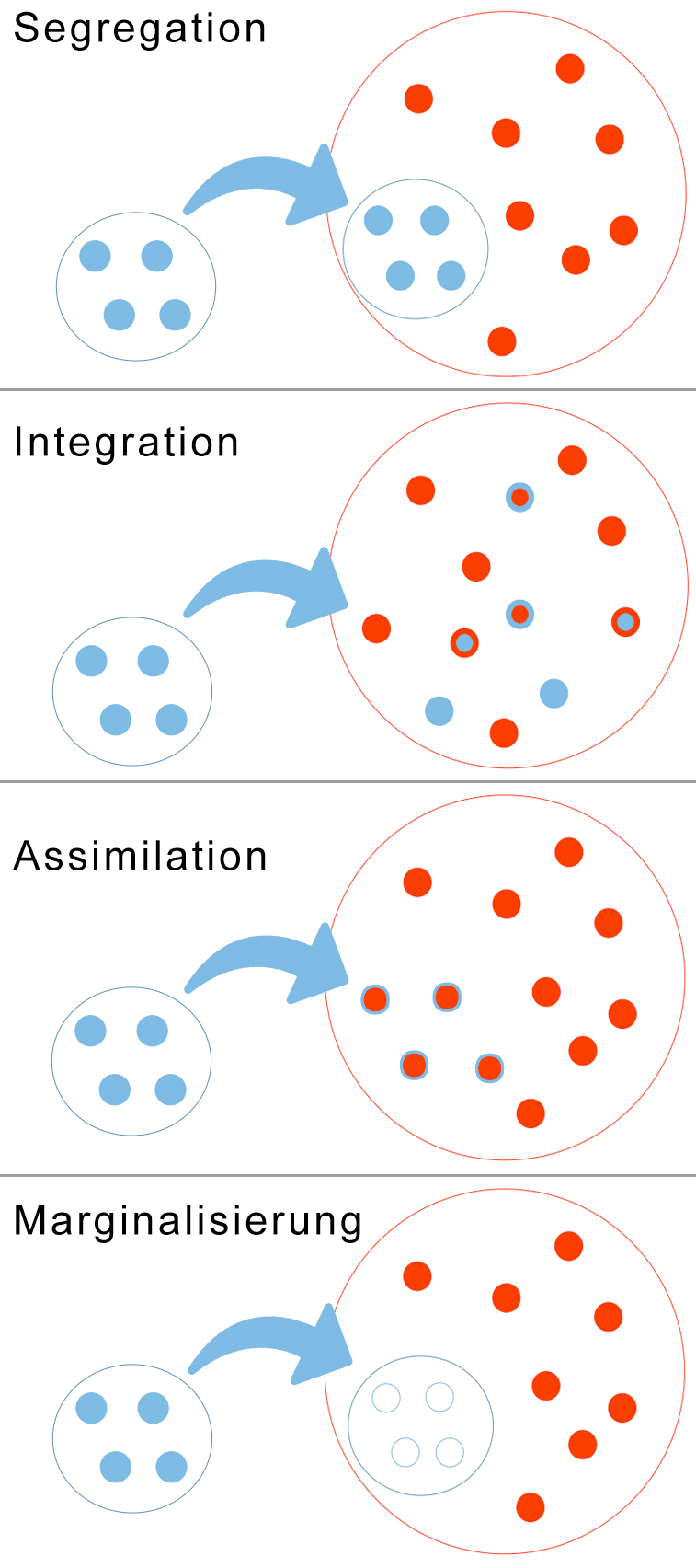 Die vier wesentlichen Formen der Akkulturation (Sozialwissenschaften)